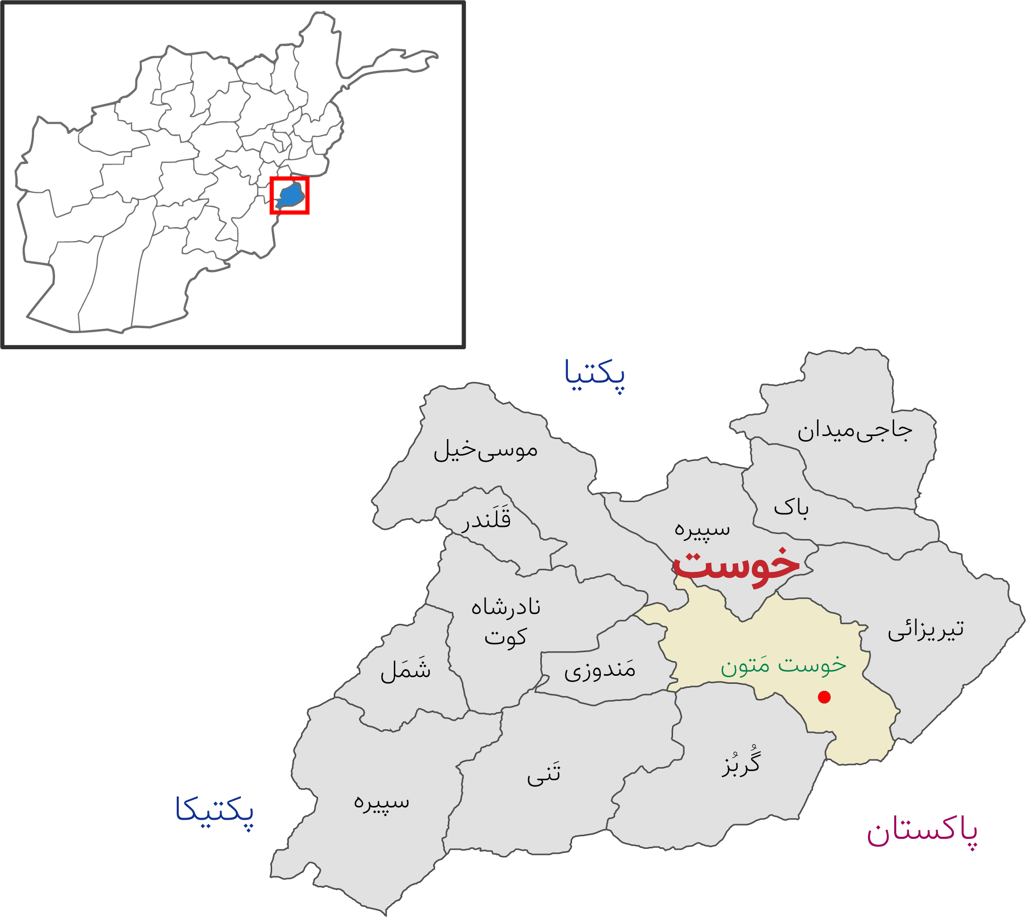 نقشه ولایت خوست